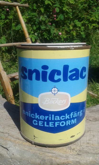 Färgburk från Beckers färgfabrik.